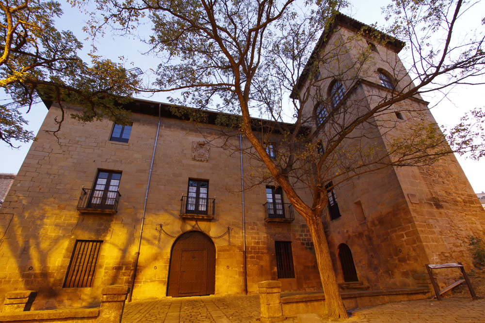 Fachada del Palacio de los Mencos, casa solariega de la familia.